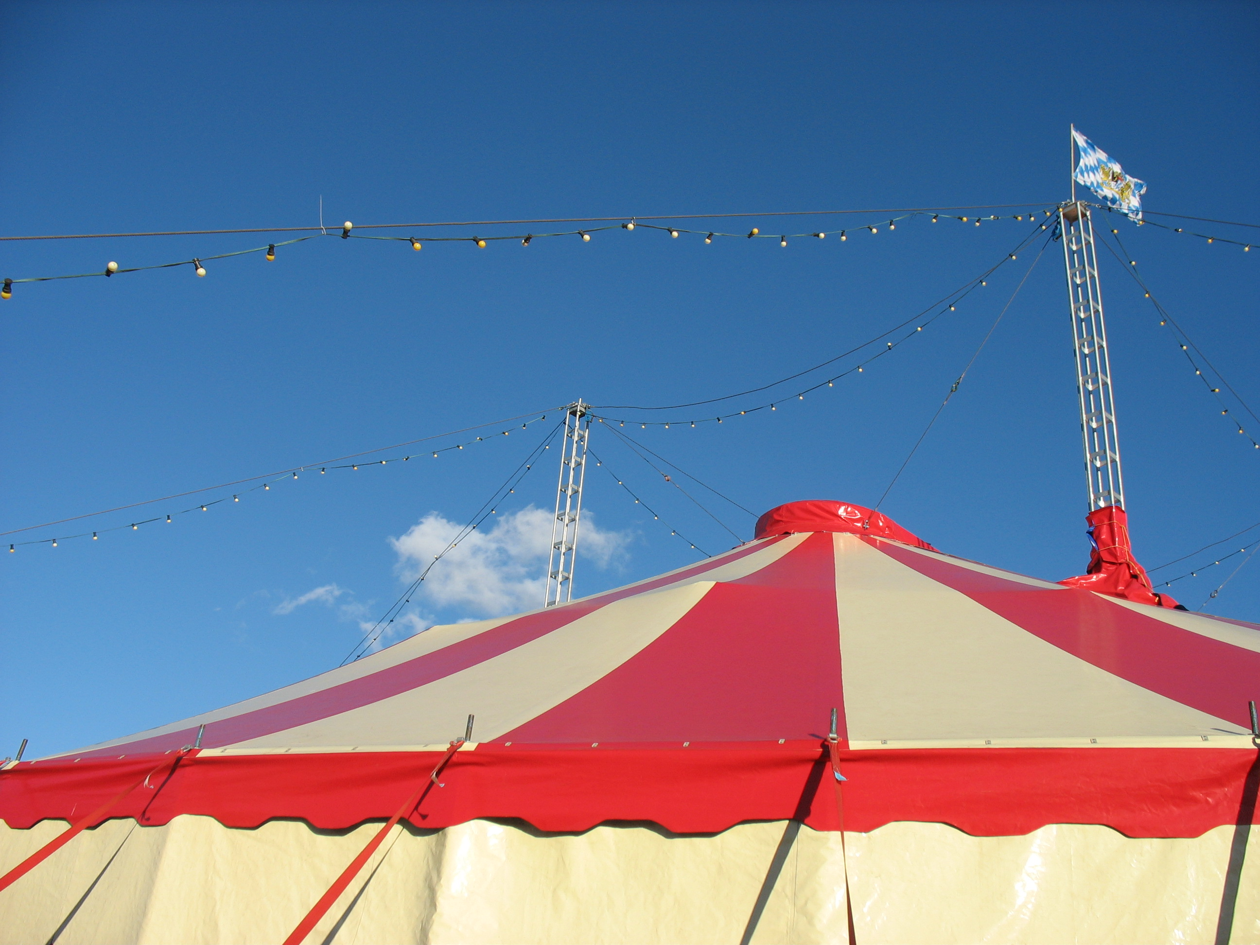 Zirkuszelt